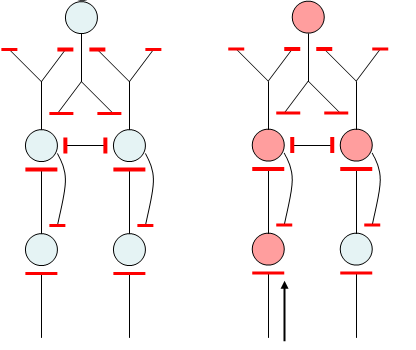 simpel netwerk